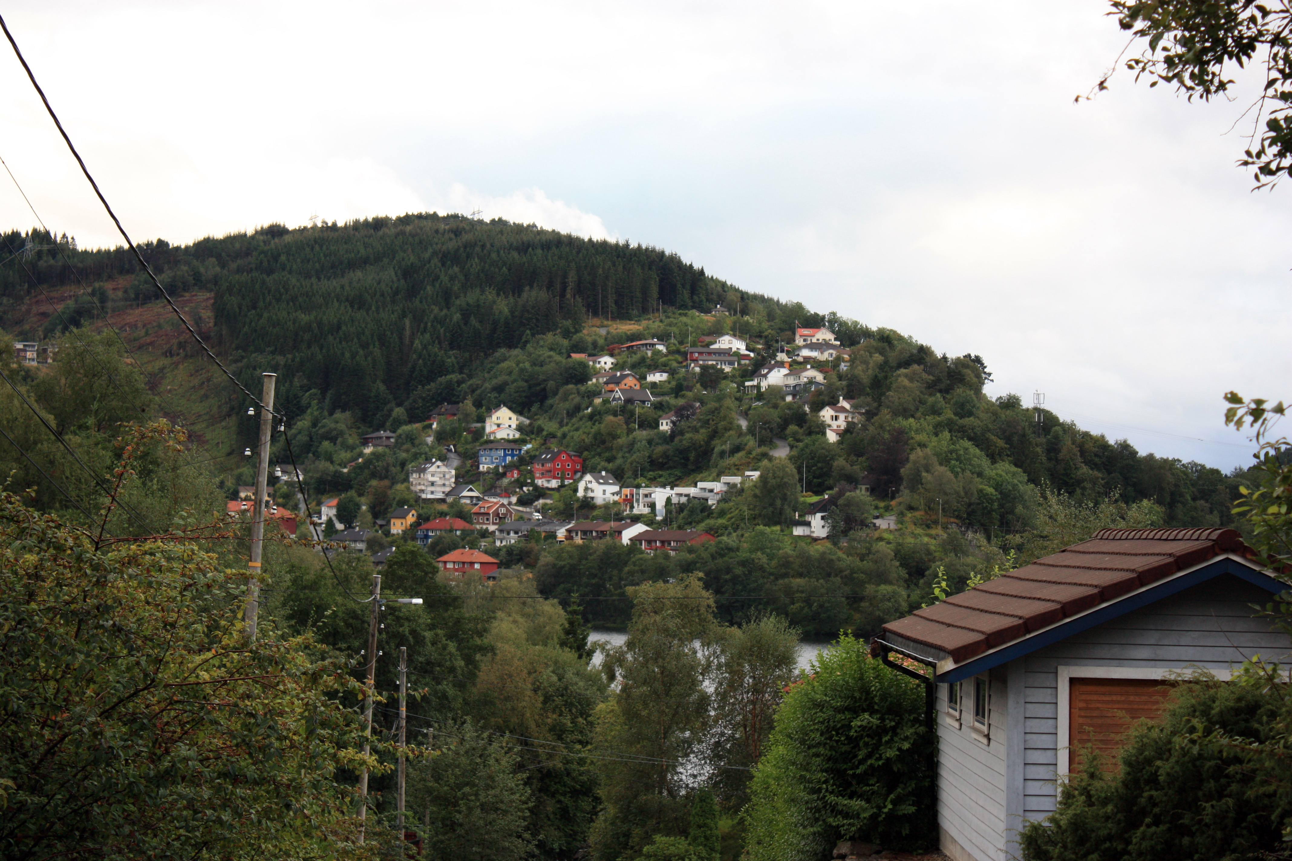 Krohnåsen in Fana, Bergen, Norway